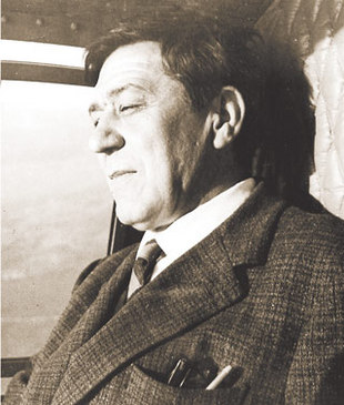 Dinu Adameșteanu, pioniere della prospezione archeologica aerofotografica, in volo in elicottero, in Italia, nel 1966 Licensing Categoria:Immagini di Dinu Adameşteanu